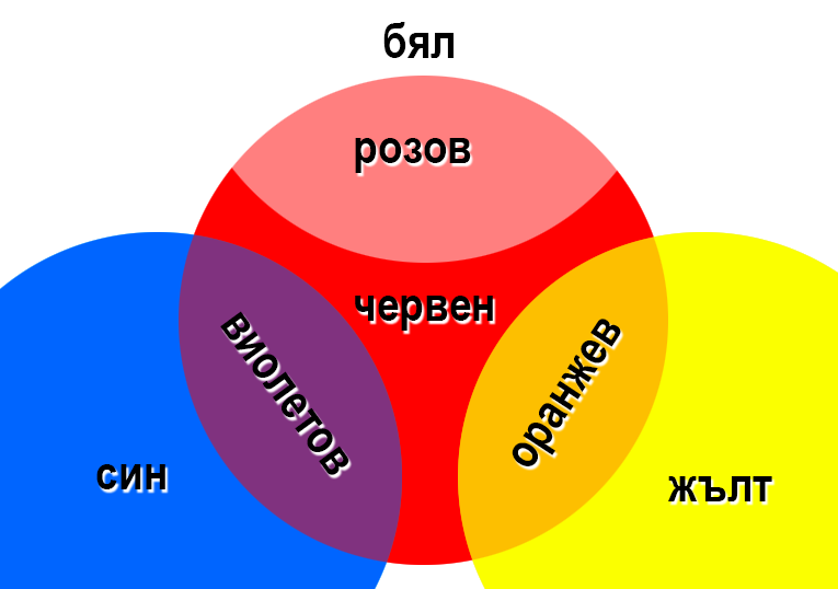 Цветове получени от смесването с червен цвят.